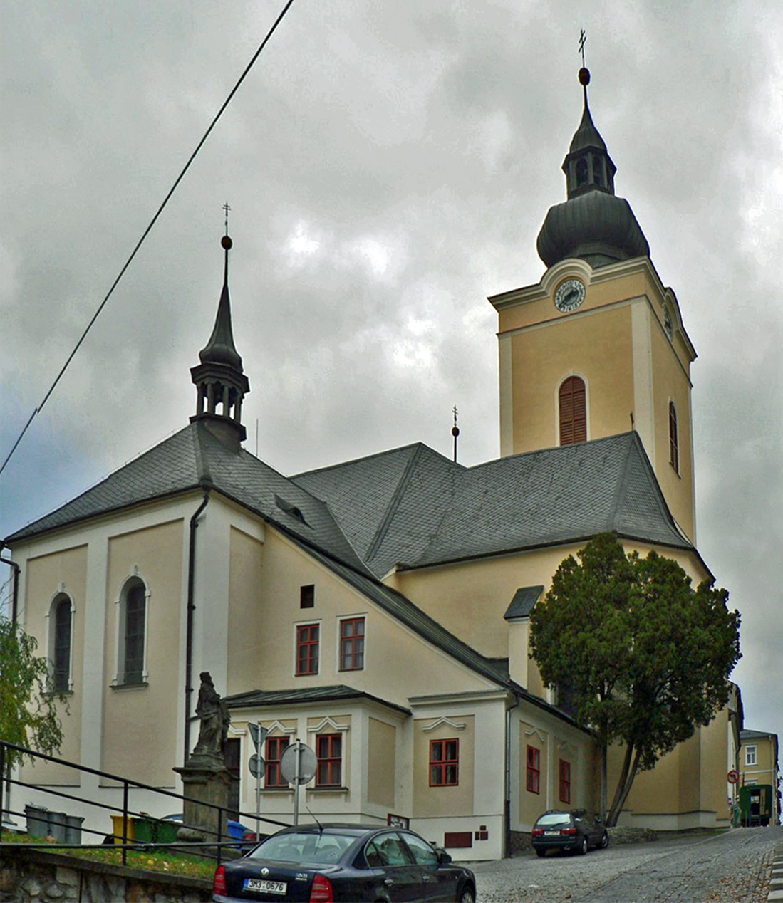 Kostel sv. Jana Křtitele v Šumperku